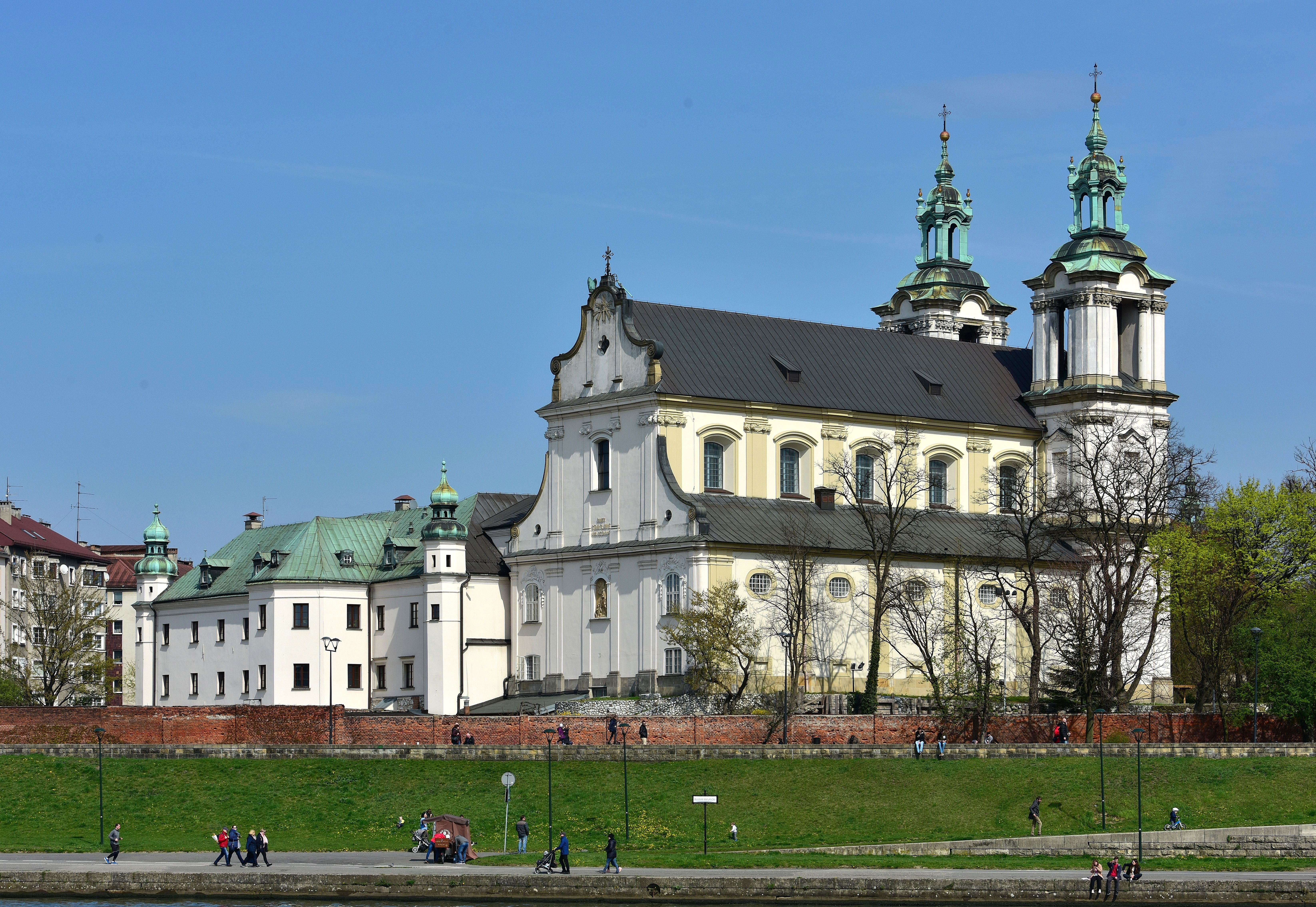 Kościół na Skłace w Krakowie od strony Wisły